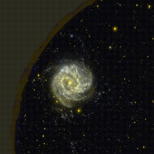 GALEX-Aufnahme von Messier 83